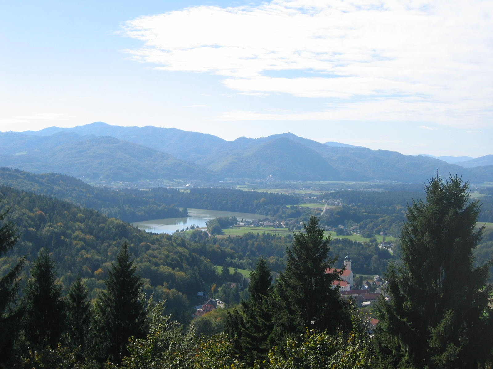 Razgled iz smledniškega gradu (Zbiljsko jezero)